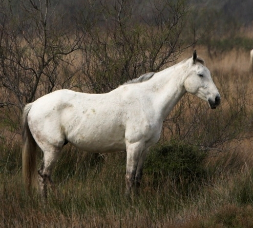 Camargue